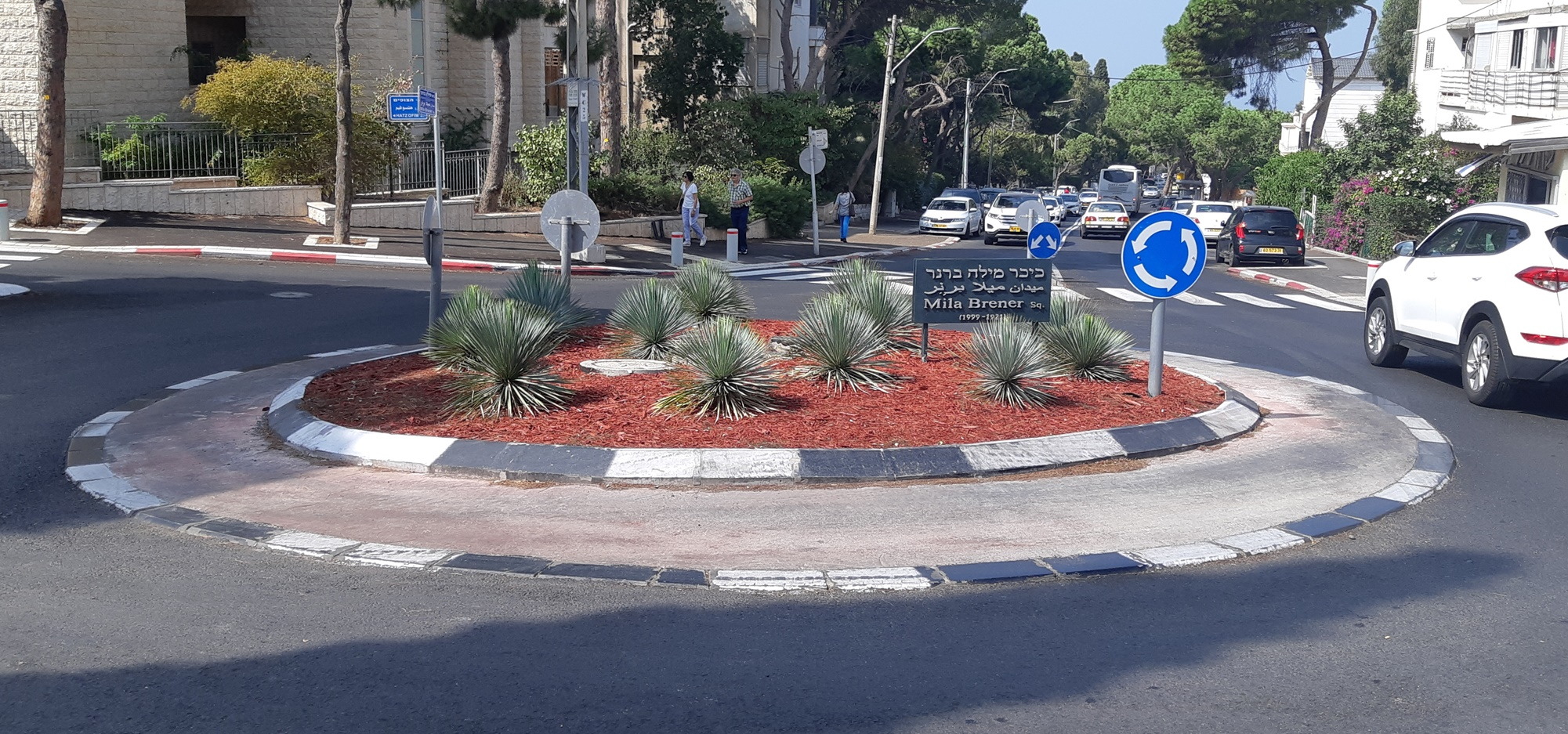 ככר על שם מילה ברנר ז"ל בחיפה